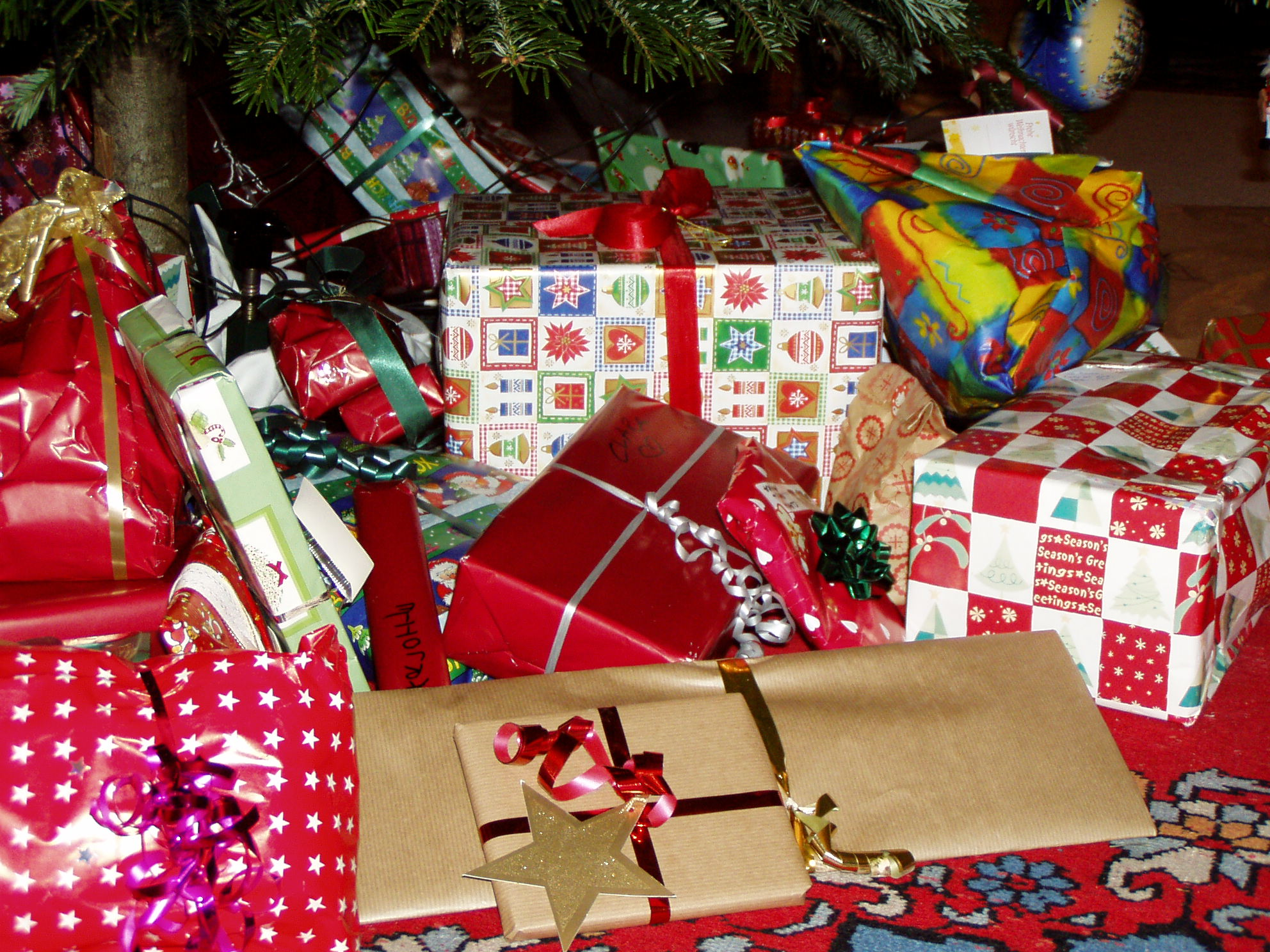 Christmas gifts